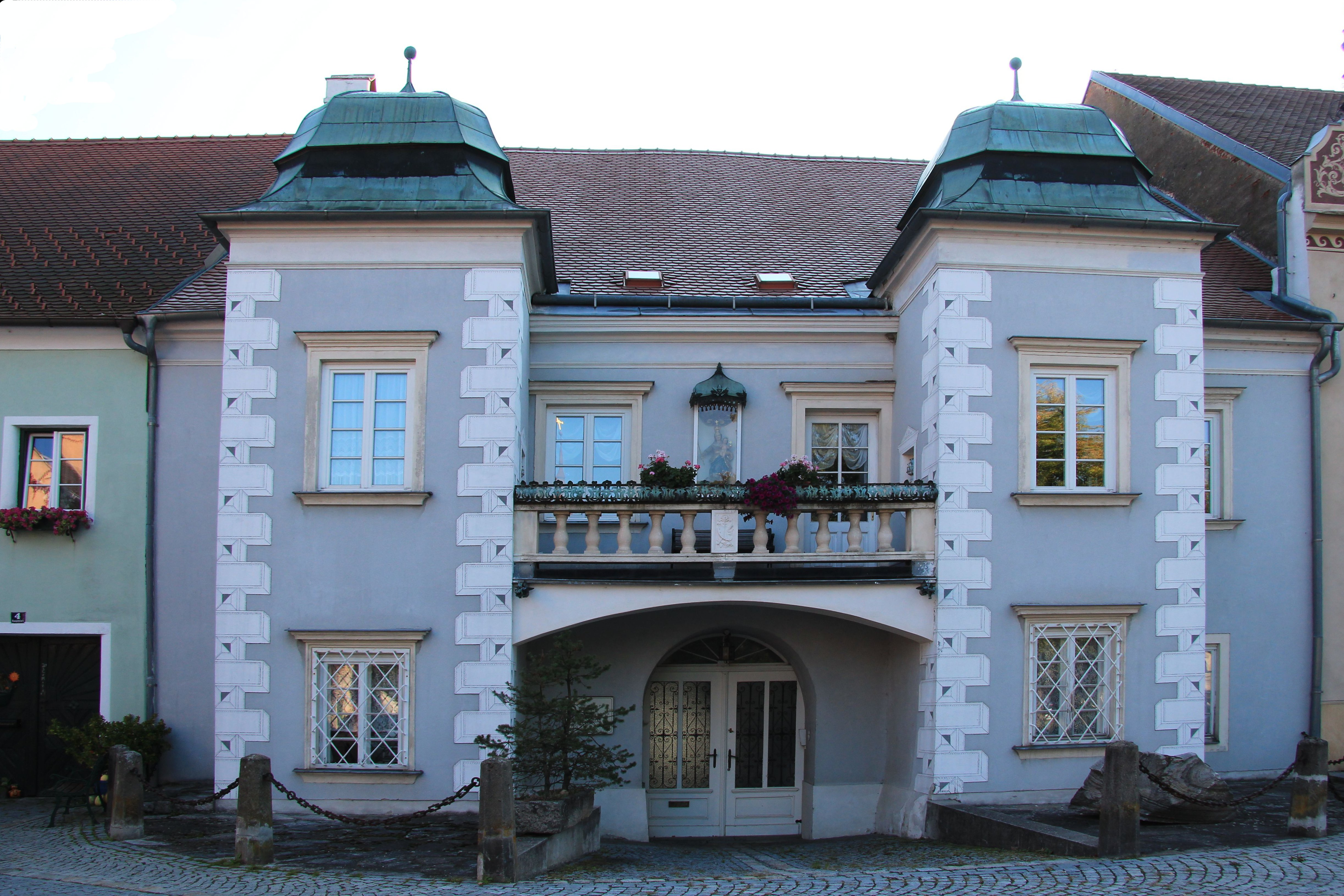 Bergamtshaus in Drosendorf, Niederösterreich